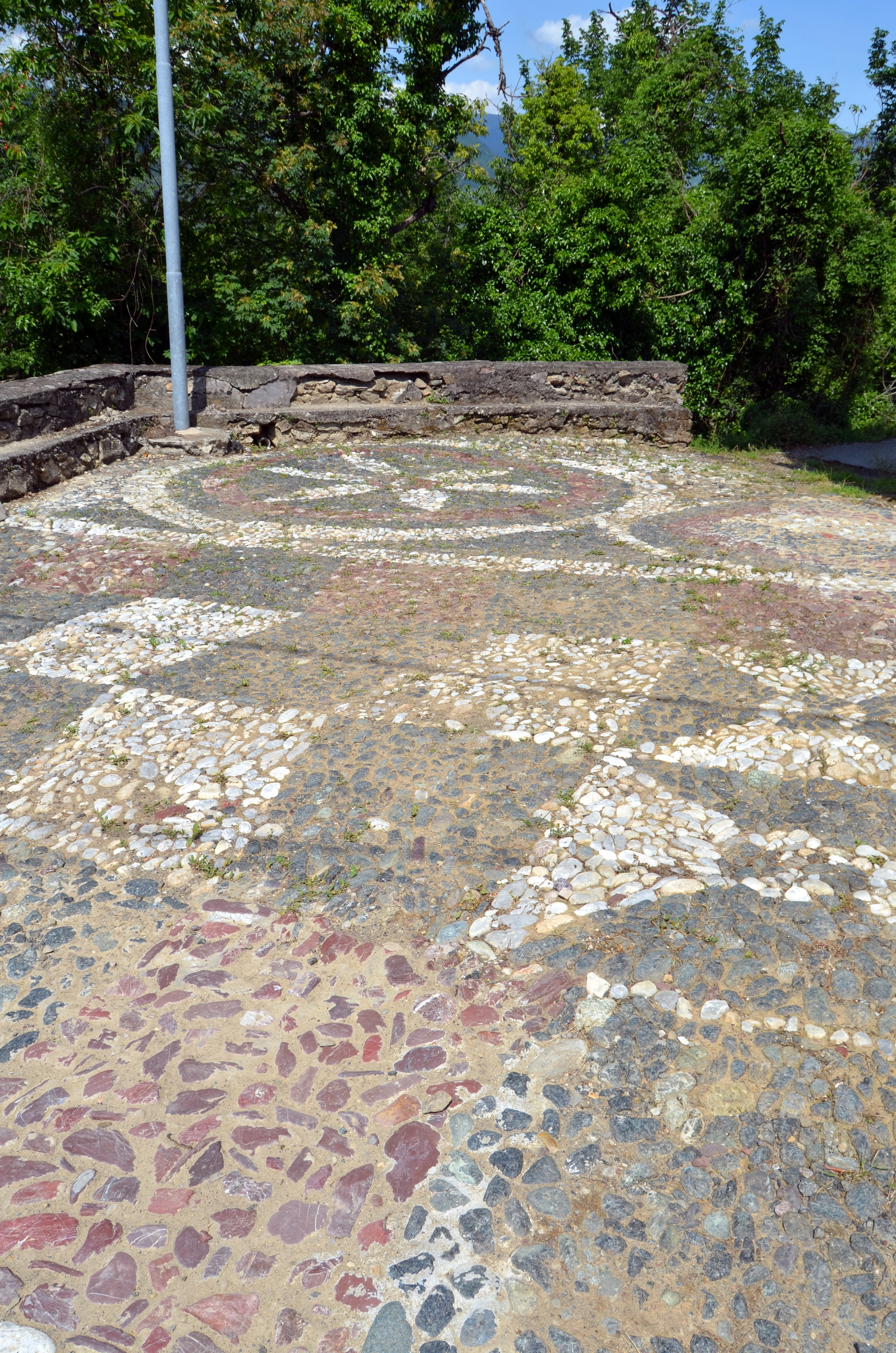 Chiesa di San Cipriano di Sambuceto, Ne, Liguria, Italia